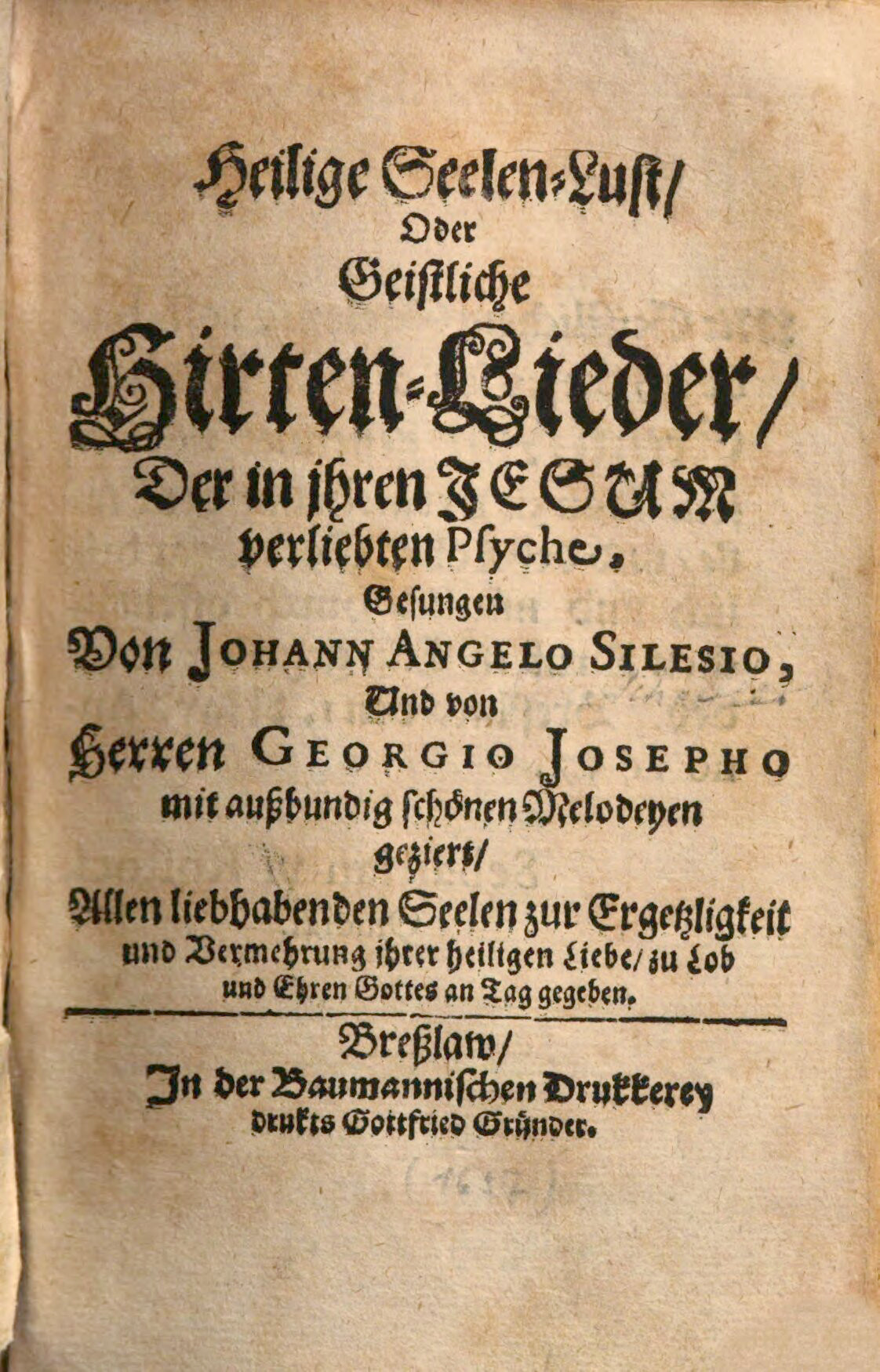 Angelus Silesius (Texte), Georg Joseph (Melodien): Heilige Seelen-Lust, oder Geistliche Hirten-Lieder der in ihren Jesum verliebten Psyche gesungen von Johann Angelo Silesio, Und von Herren Georgio Josepho mit außbundig schönen Melodeyen geziert / Allen liebhabenden Seelen zur Ergetzligkeit und Vermehrung ihrer heiligen Liebe / zu Lob und Ehren Gottes an Tag gegeben, Breslau 1657, Titelseite